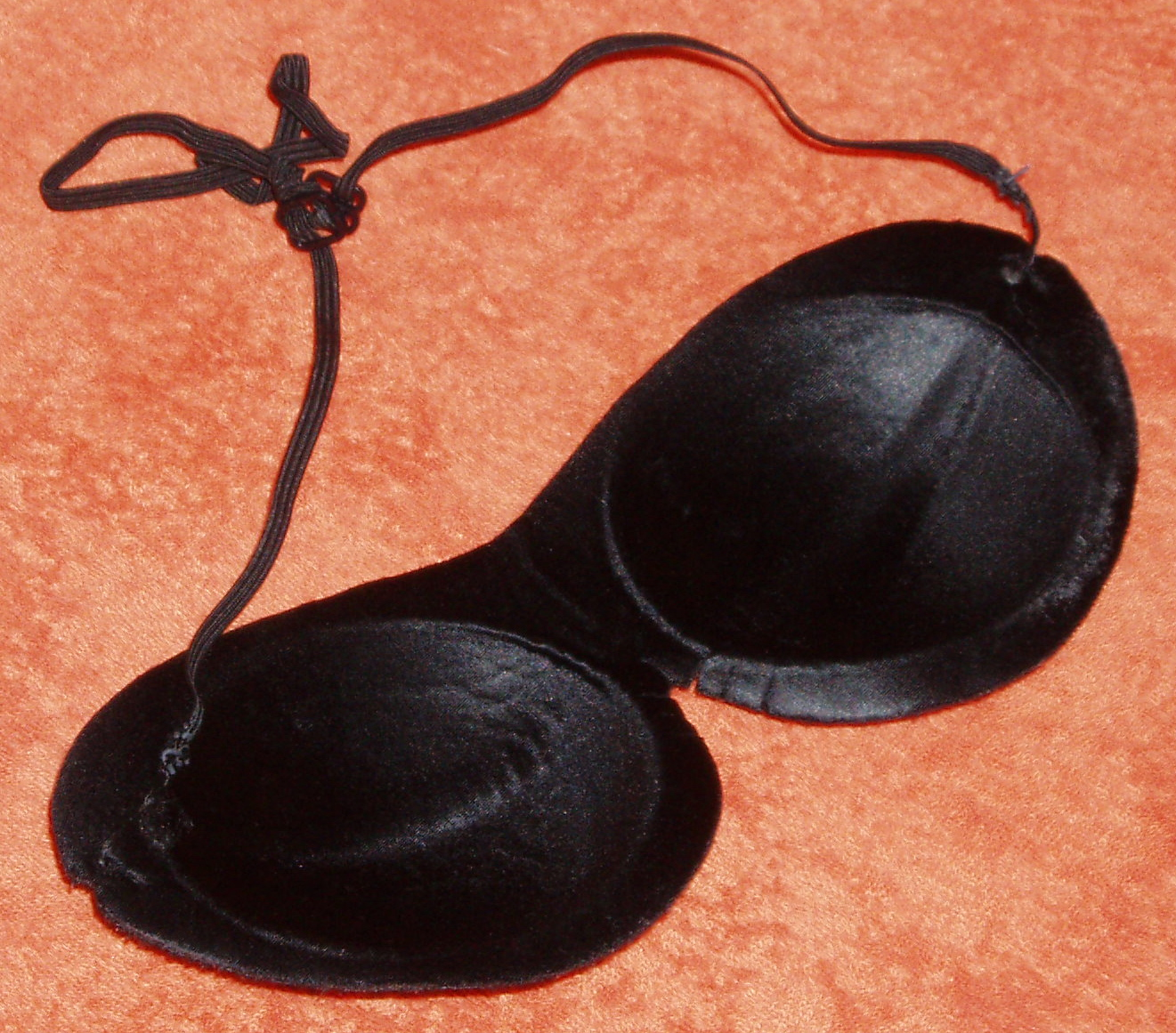 Schlafmaske